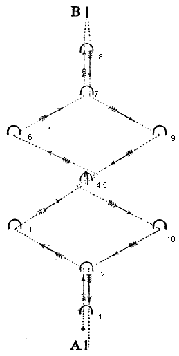 From Projekt Runeberg